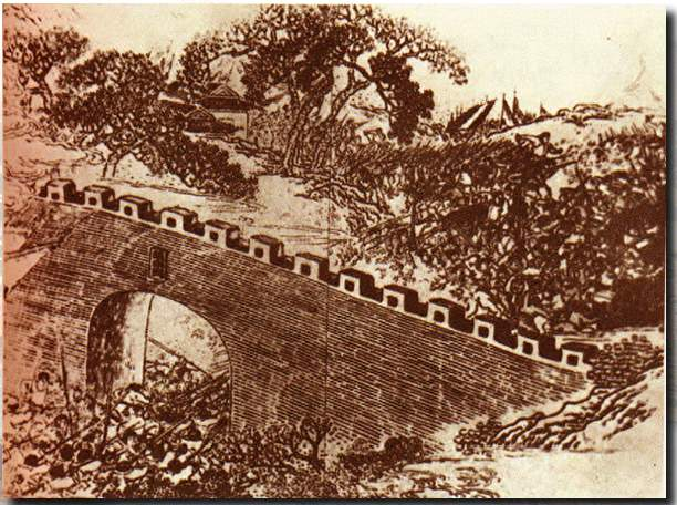 镇南关大捷圖